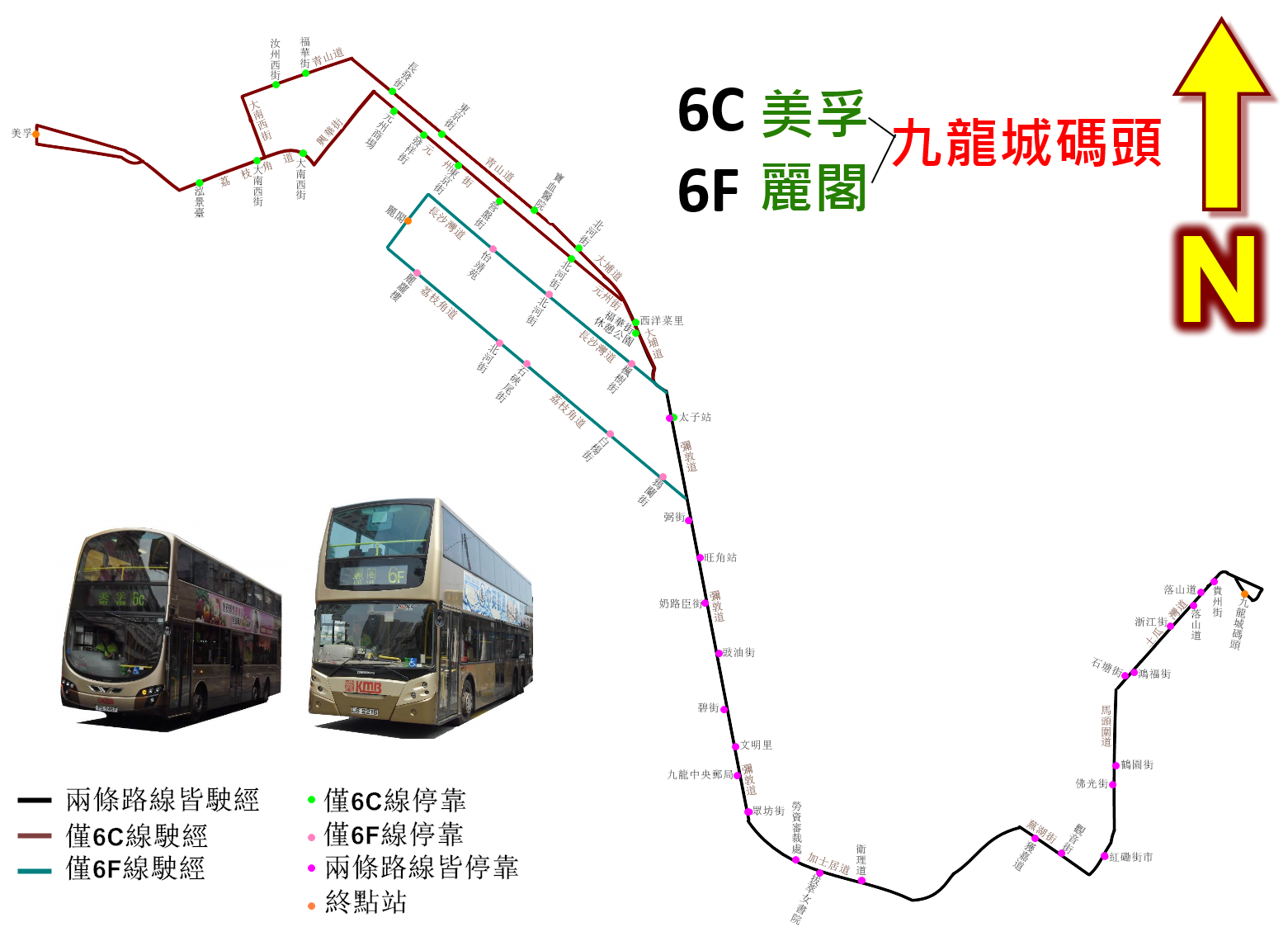 中文（香港）: 九巴6C線及6F線的走線圖，當中棕色的只有6C線駛經，藍綠色的只有6F線駛經